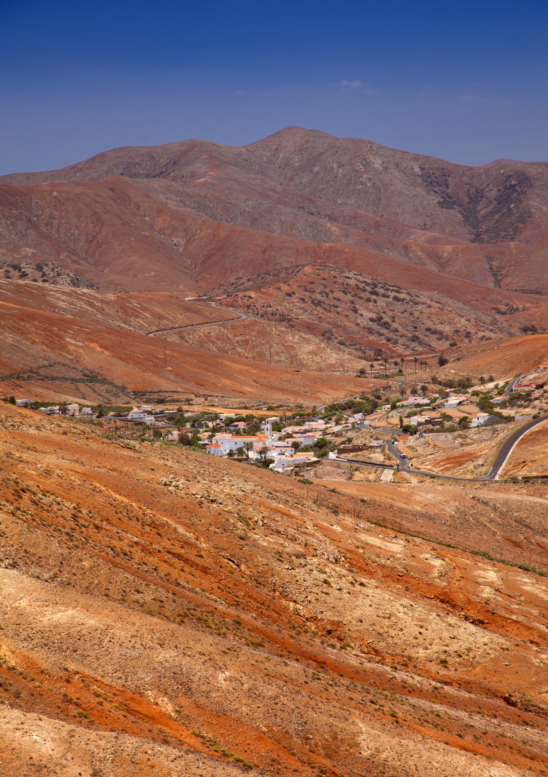 Parque Rural de Betancuria This is a photography of a Site of Community Importance in Spain with the ID: ES7010062. Natura2000 entry, EEA entry